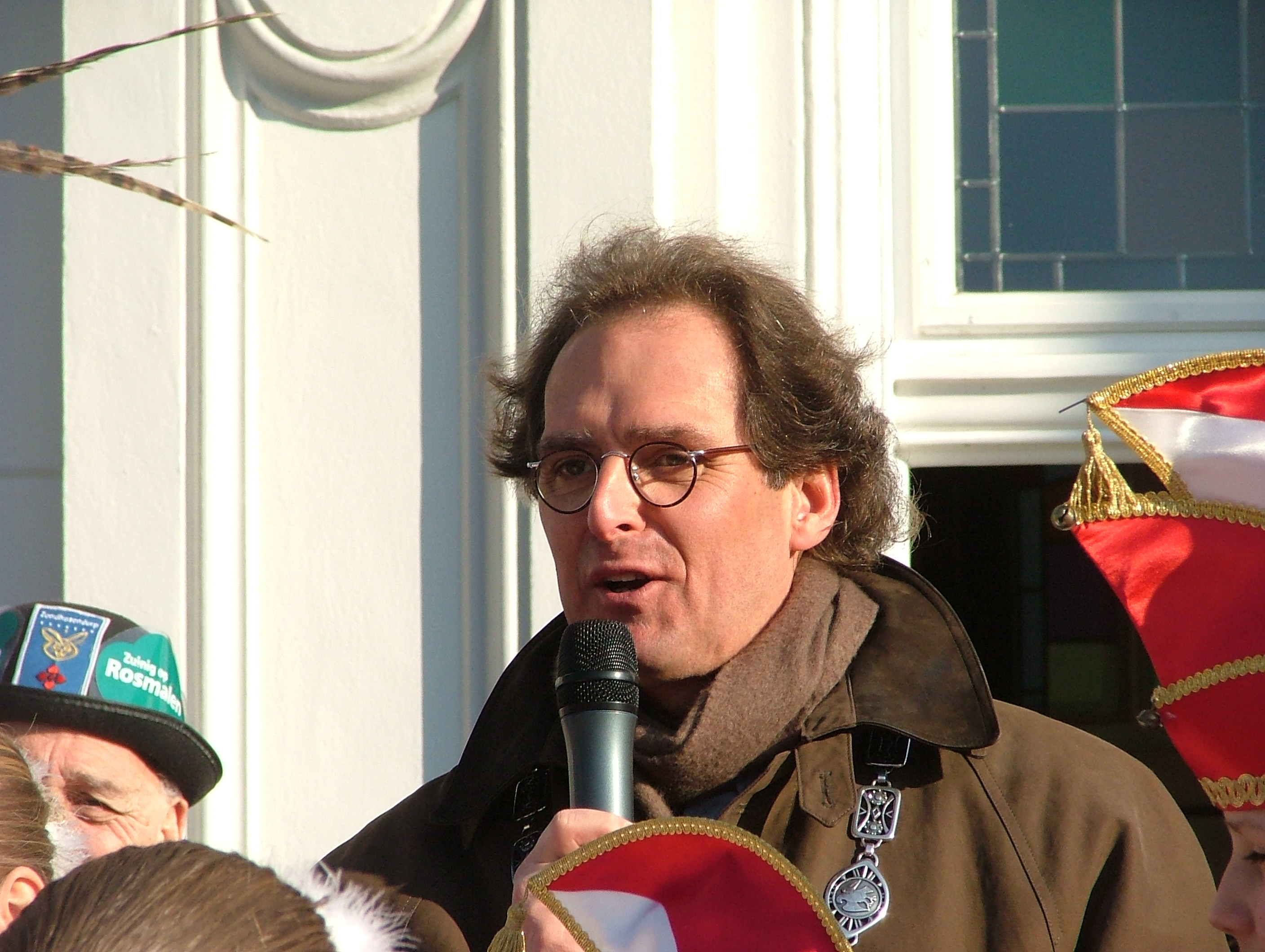 Ton Rombouts als burgemeester van 's-Hertogenbosch bij de opening van het carnaval in Zandhazendurp in 2006.